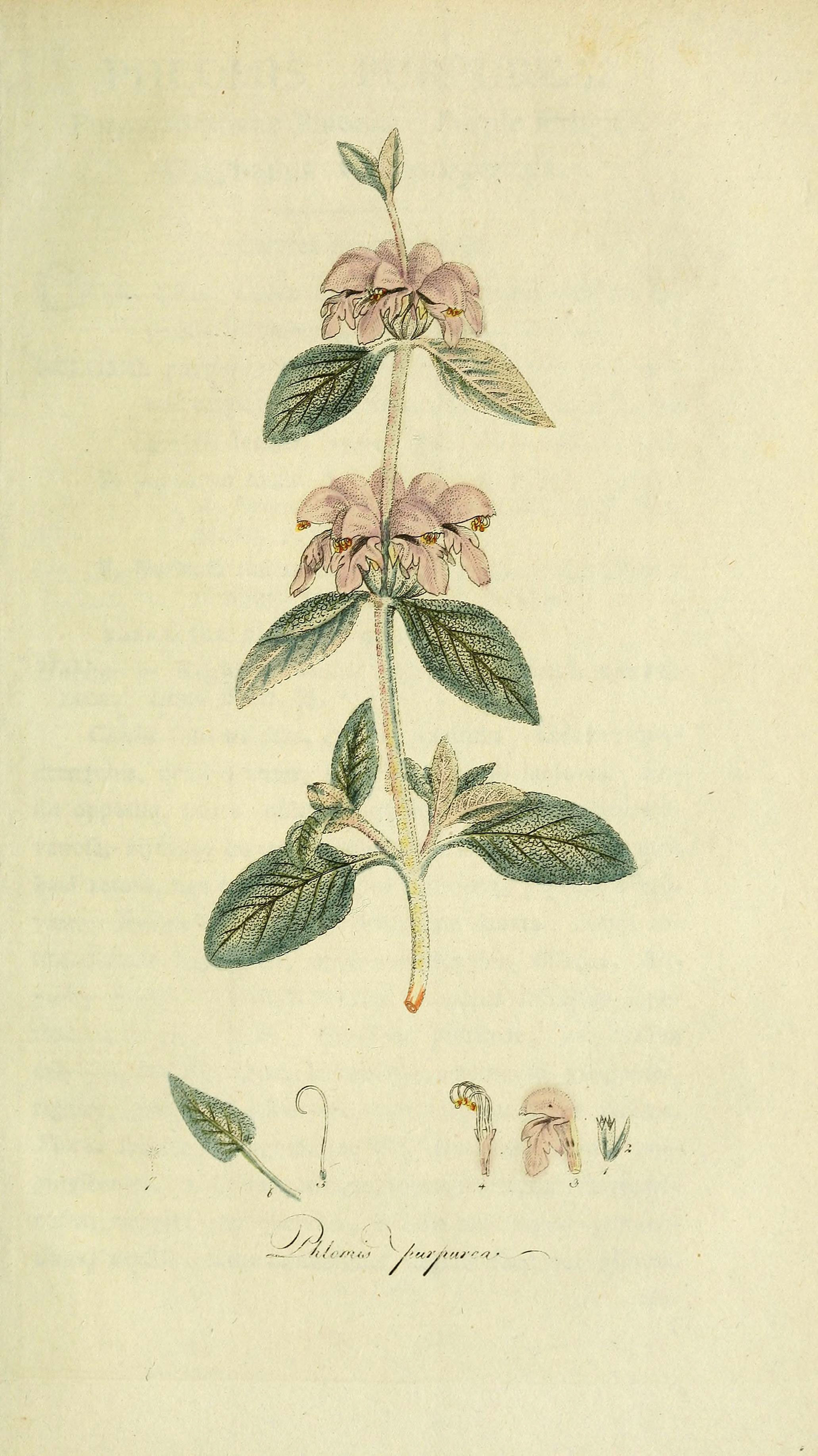 XI fj-Tyfl ' /"■/'